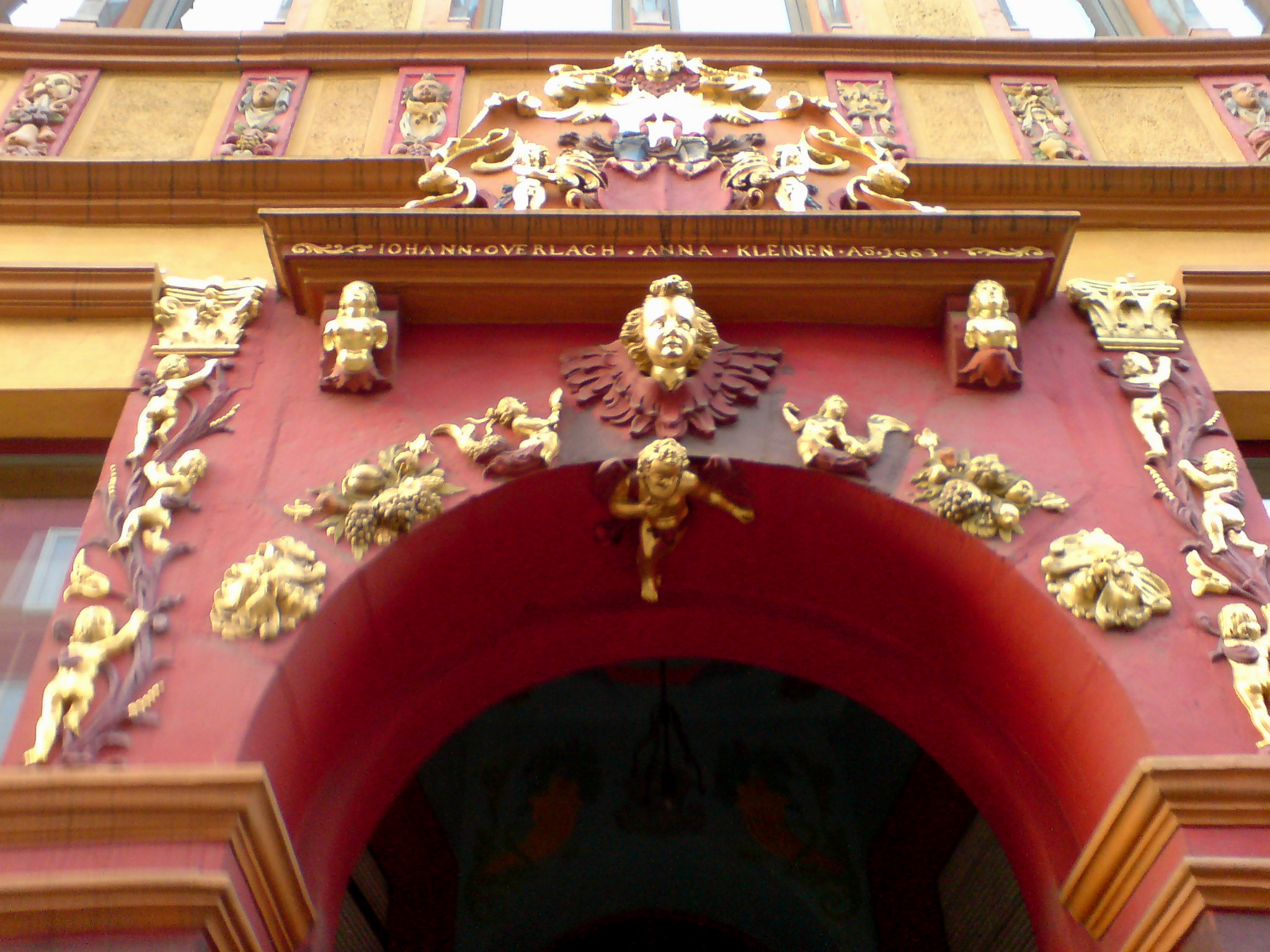 Adrian Siemerding (Deutscher, † 1673): Fassade "Haus Overlach" (1663), ursprünglich "Am Markte", seit 1884 Lavesstrasse 82, Hannover.